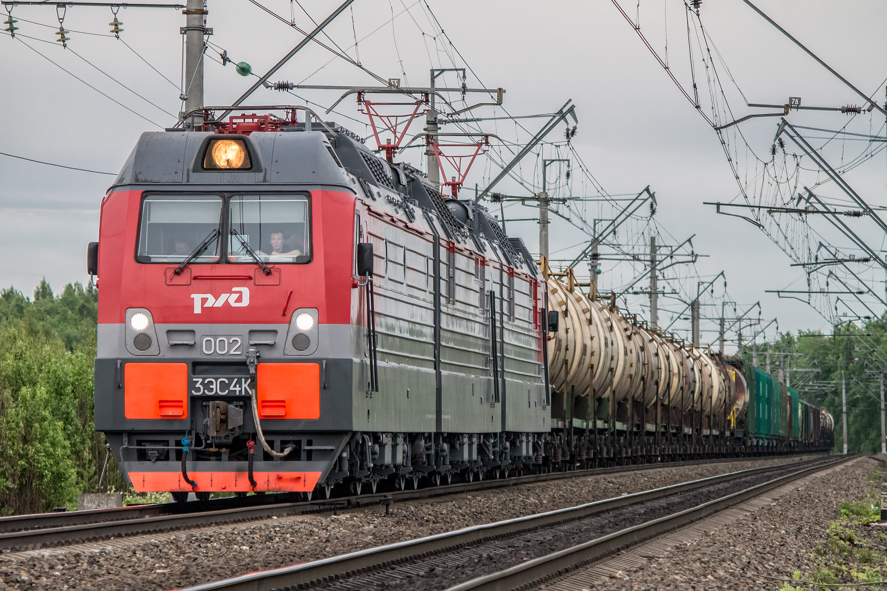 3ЭС4К-002, Пелла - Сапёрная см. фото 694255 в альбоме автора